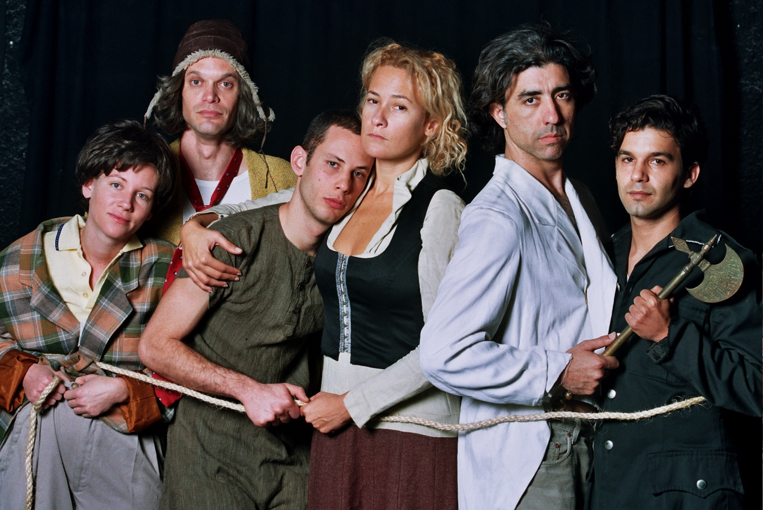 חדקול